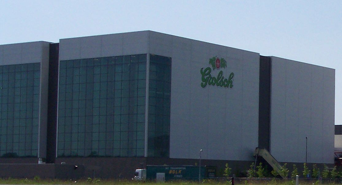 Boekelo Enschede Grolsch brewery.